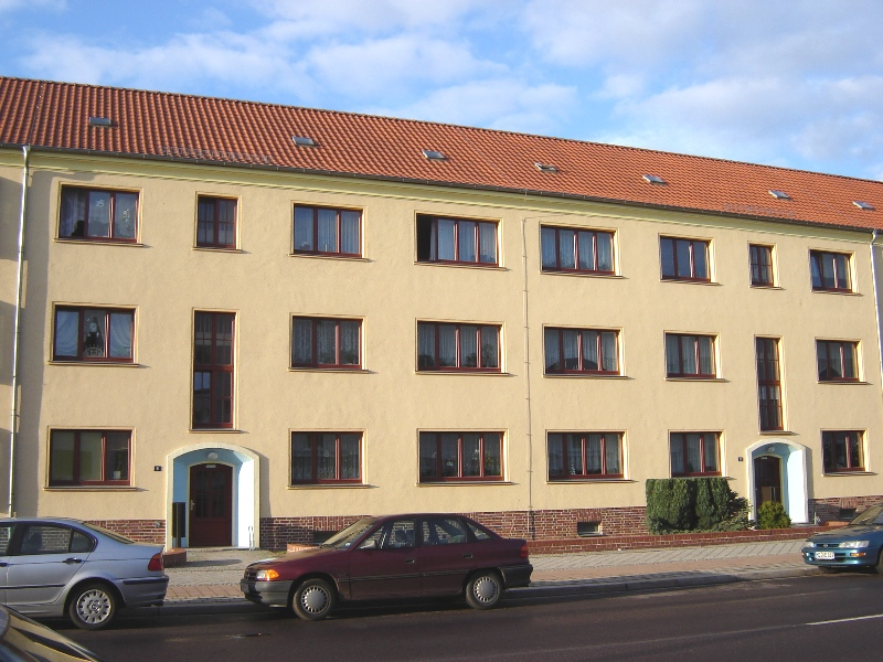 Georg-Heidler-Strasse, Magdeburg (Germany)